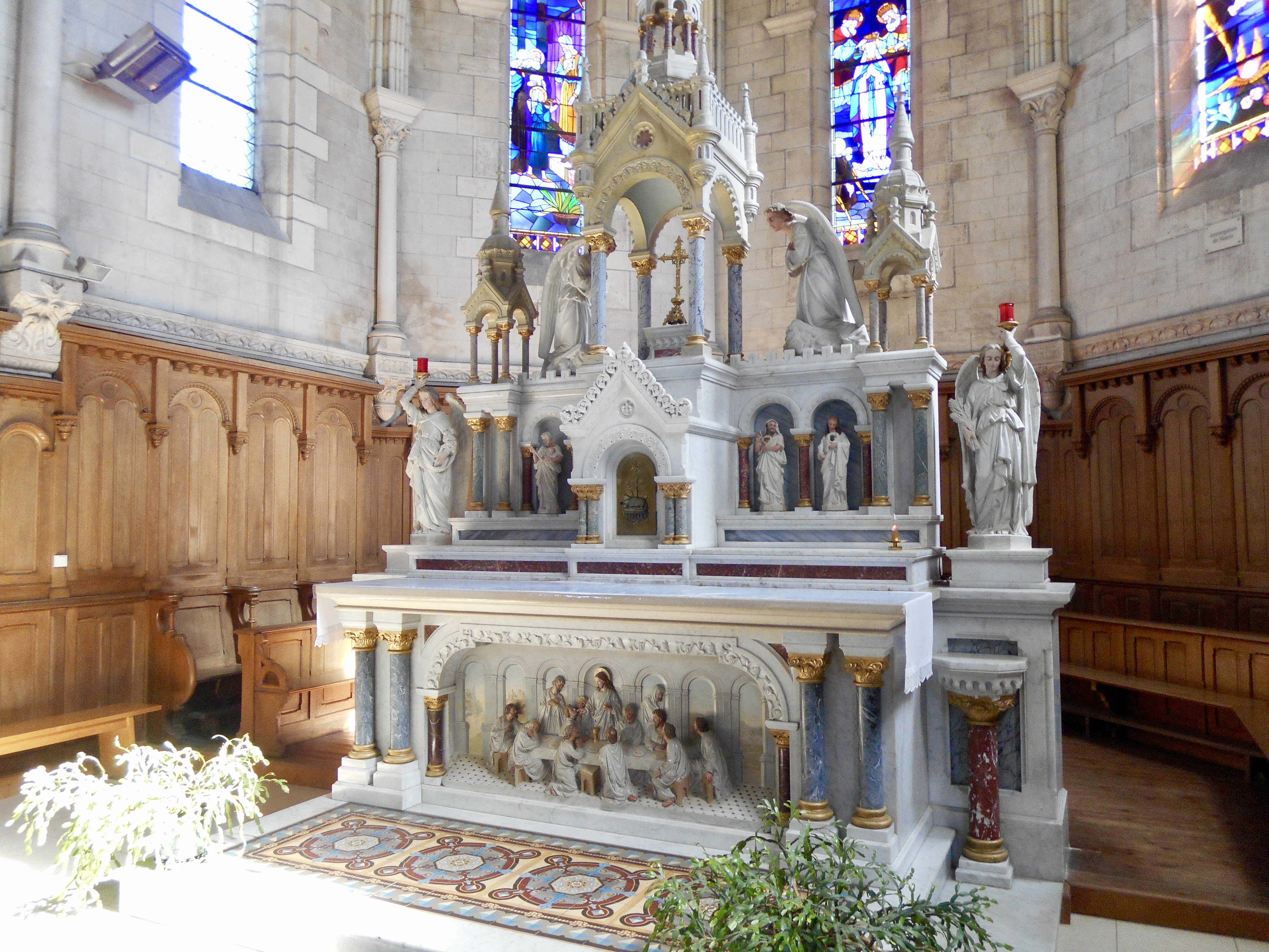 Retable de l'église Notre-Dame-de-l'Assomption de Notre-Dame-de-Monts (2019)